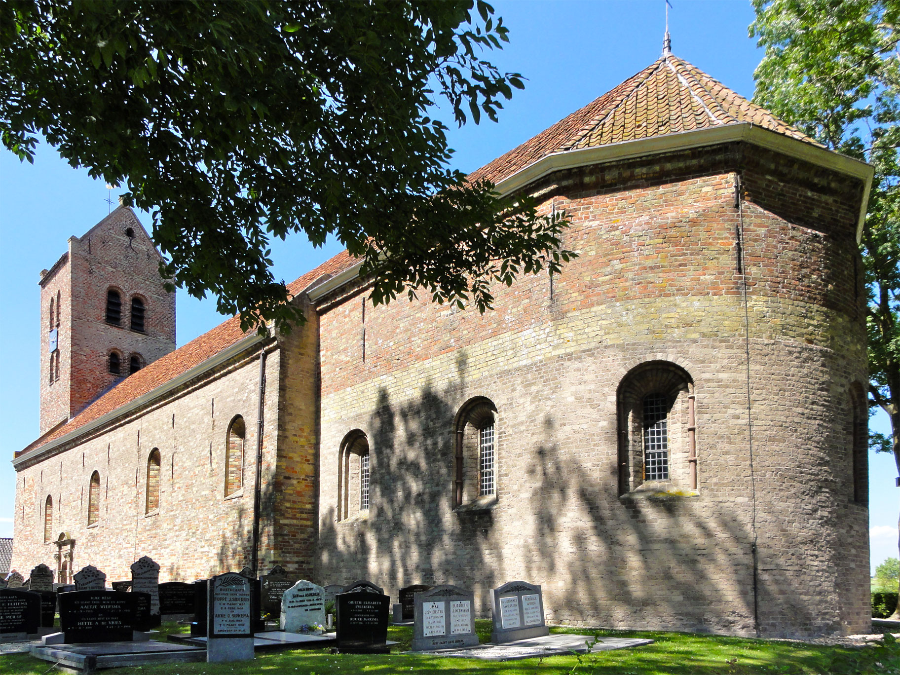 Sint Martinuskerk van Boazum